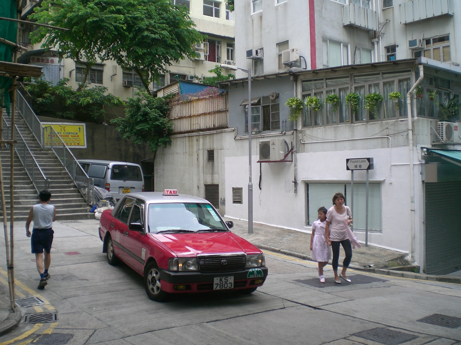 磅巷 (英文: Pound Lane), 香港的士